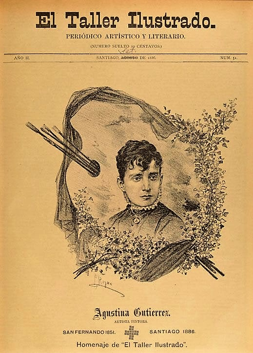 Fundado en Santiago por el escultor José Miguel Blanco, este semanario fue una publicación pionera en la difusión y crítica del arte nacional, hecha por artistas y para artistas.